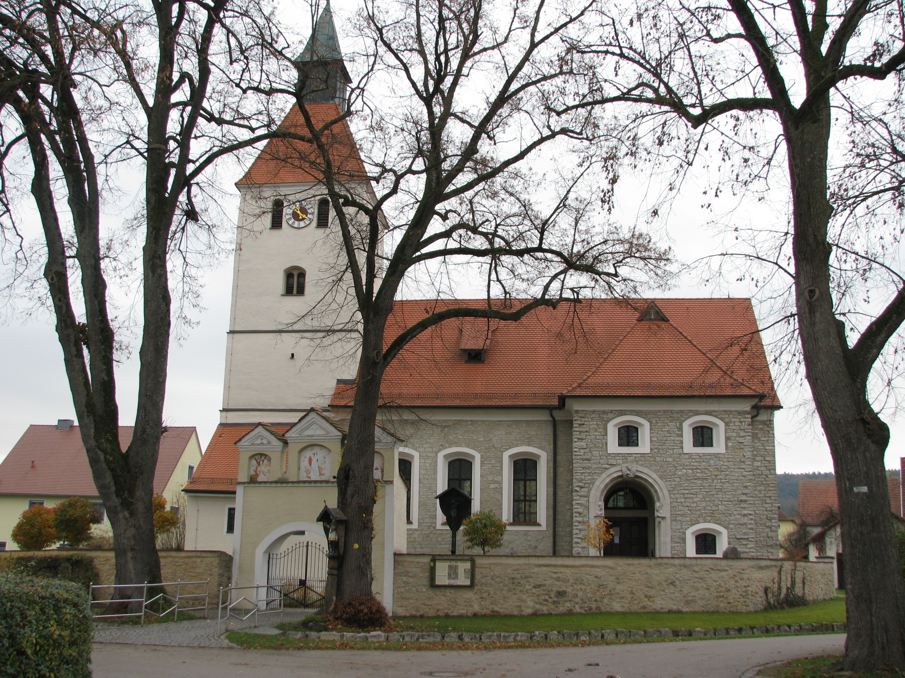 Erasbach, Landkreis Neumarkt in der Oberpfalz, Kath. Pfarrkirche Mariä Heimsuchung, Nordseite